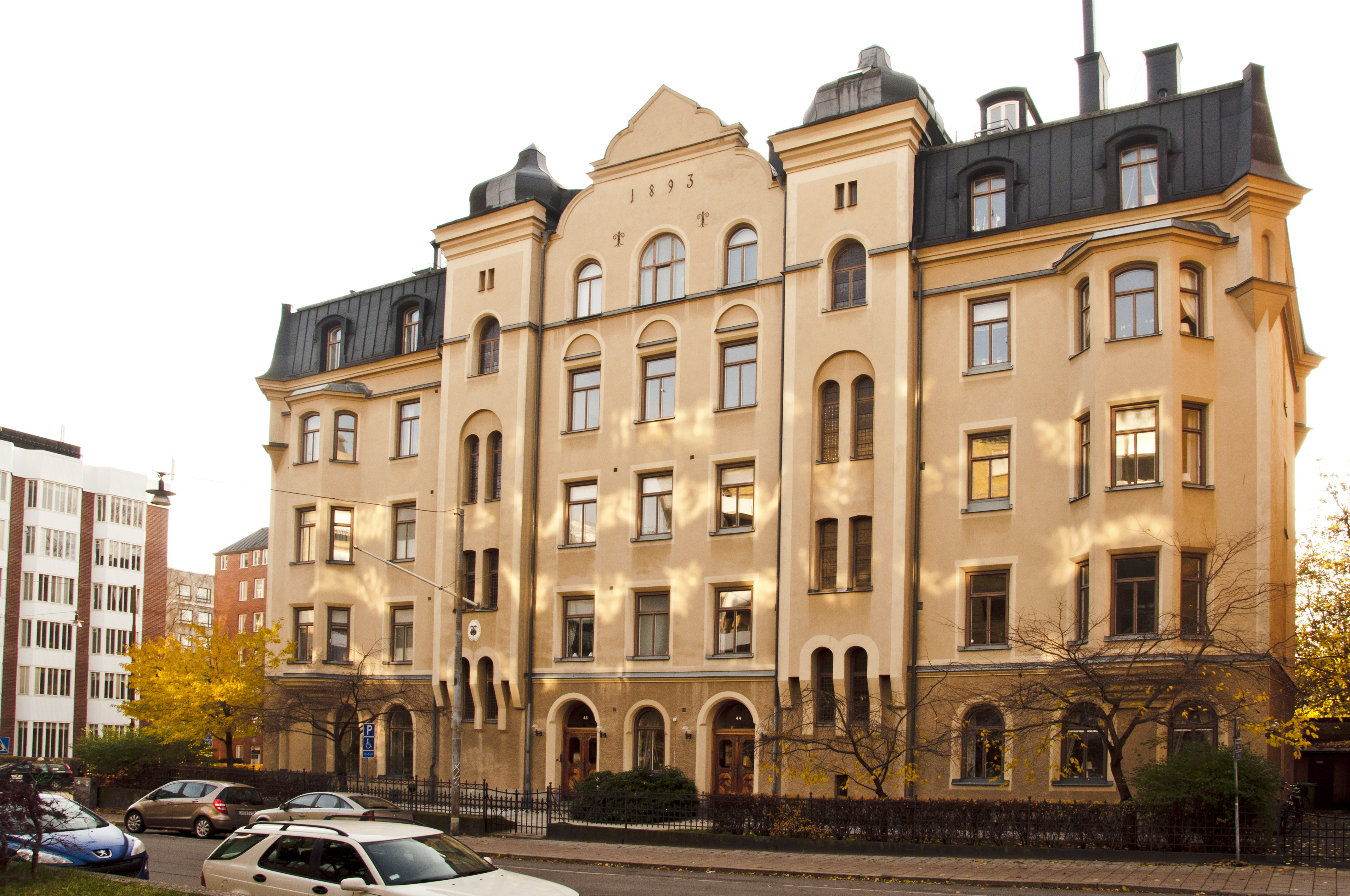 Colombias ambassad. Östermalmsgatan 44-46, Floragatan 9. Byggnadsår 1892-93 , arkitekt Johan Laurentz, byggherre och byggmästare P A Wersén.